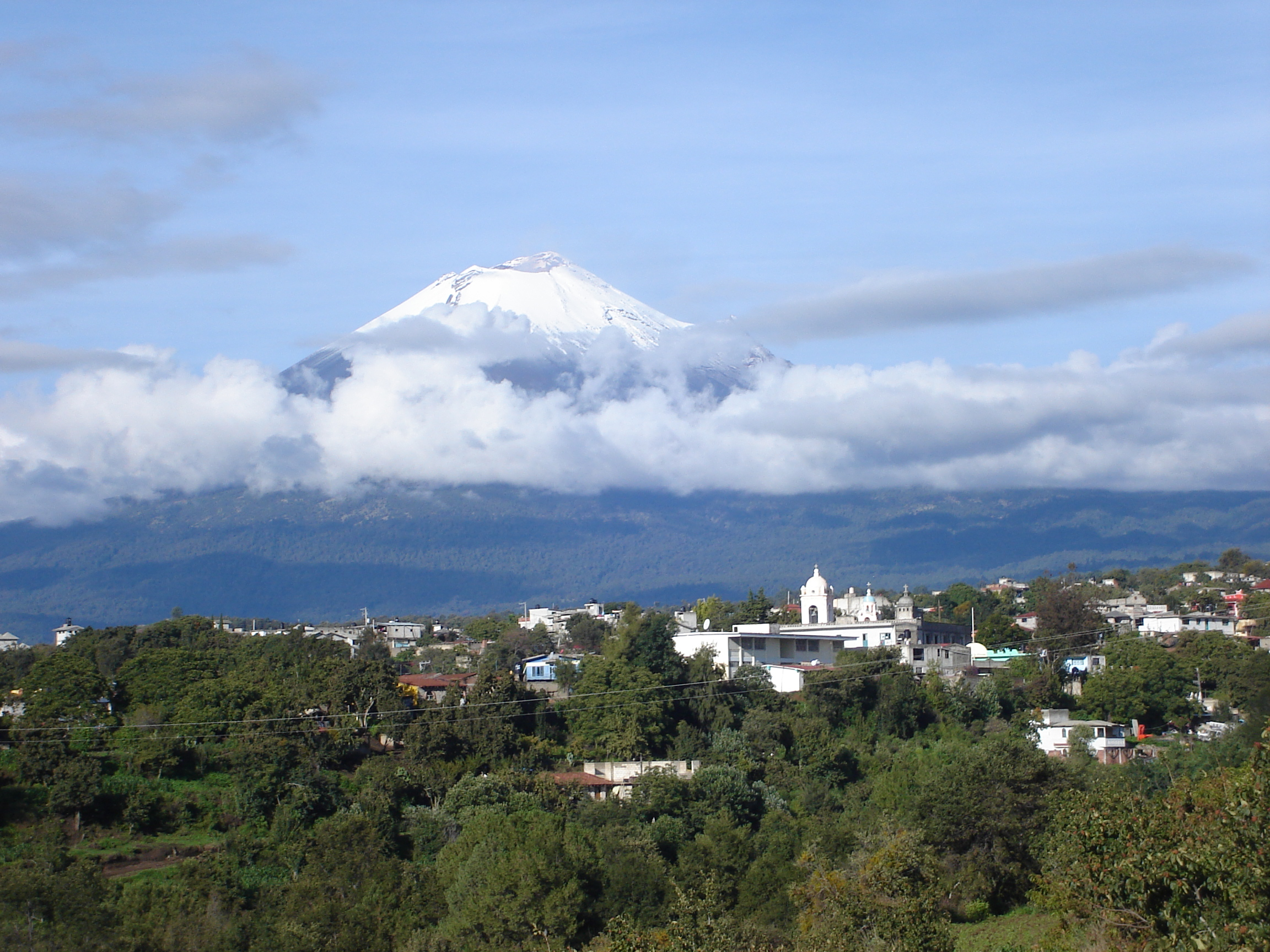 Desde el campo deportivo de Atexcac, en la que se aprecia la Iglesia y Primaria Federal, al fondo el imponente volcán Popocatépetl.